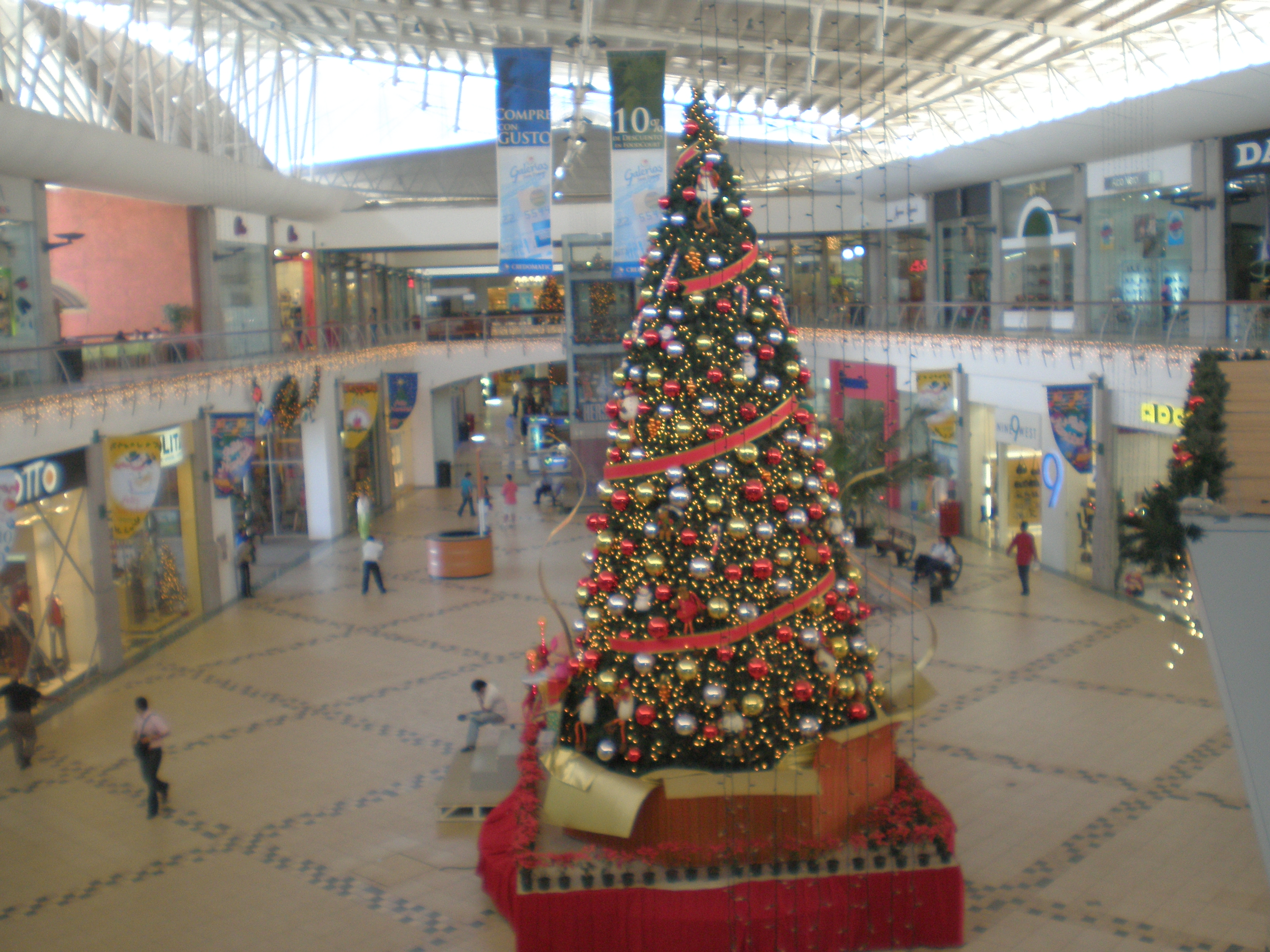 Interior de Galerías Santo Domingo en la navidad del 2006